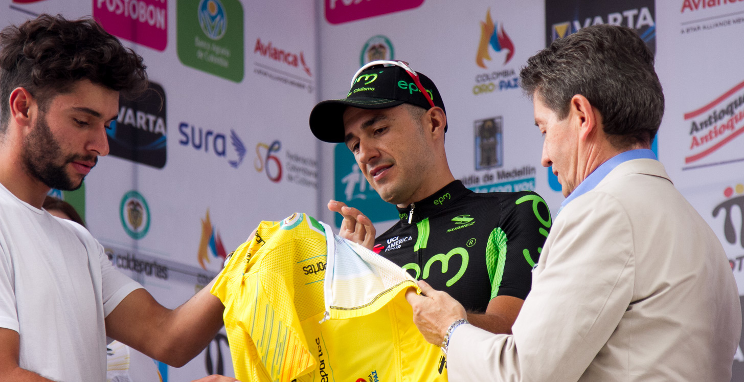 El podio con Fernando Gaviria, Juan Pablo Suárez y Luis Pérez Gutiérrez Etapa 1 Vuelta a Colombia 2017 CRE Rionegro - La Ceja. 18Kms